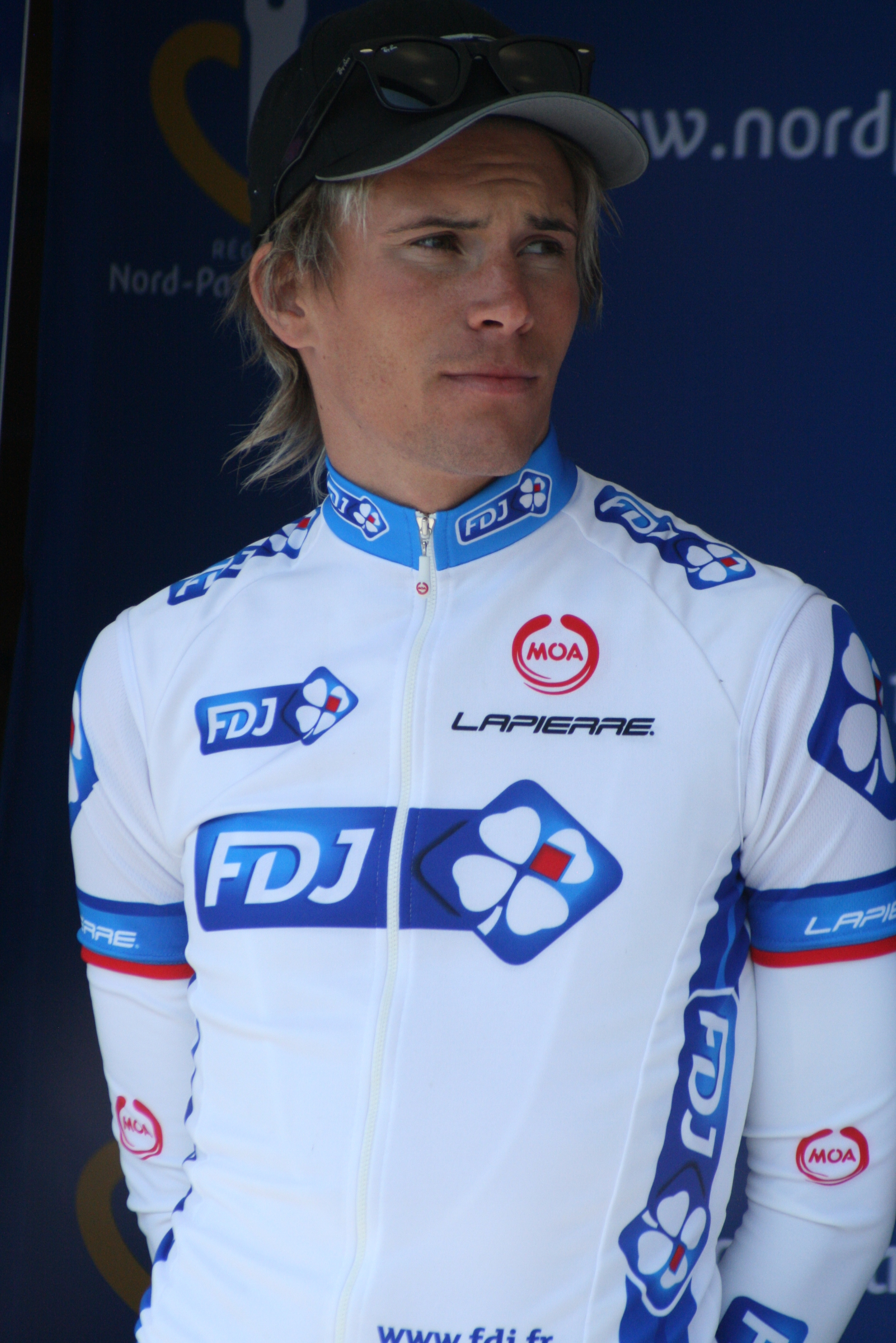 Présentation des coureurs au départ de la première étape Yoann Offredo